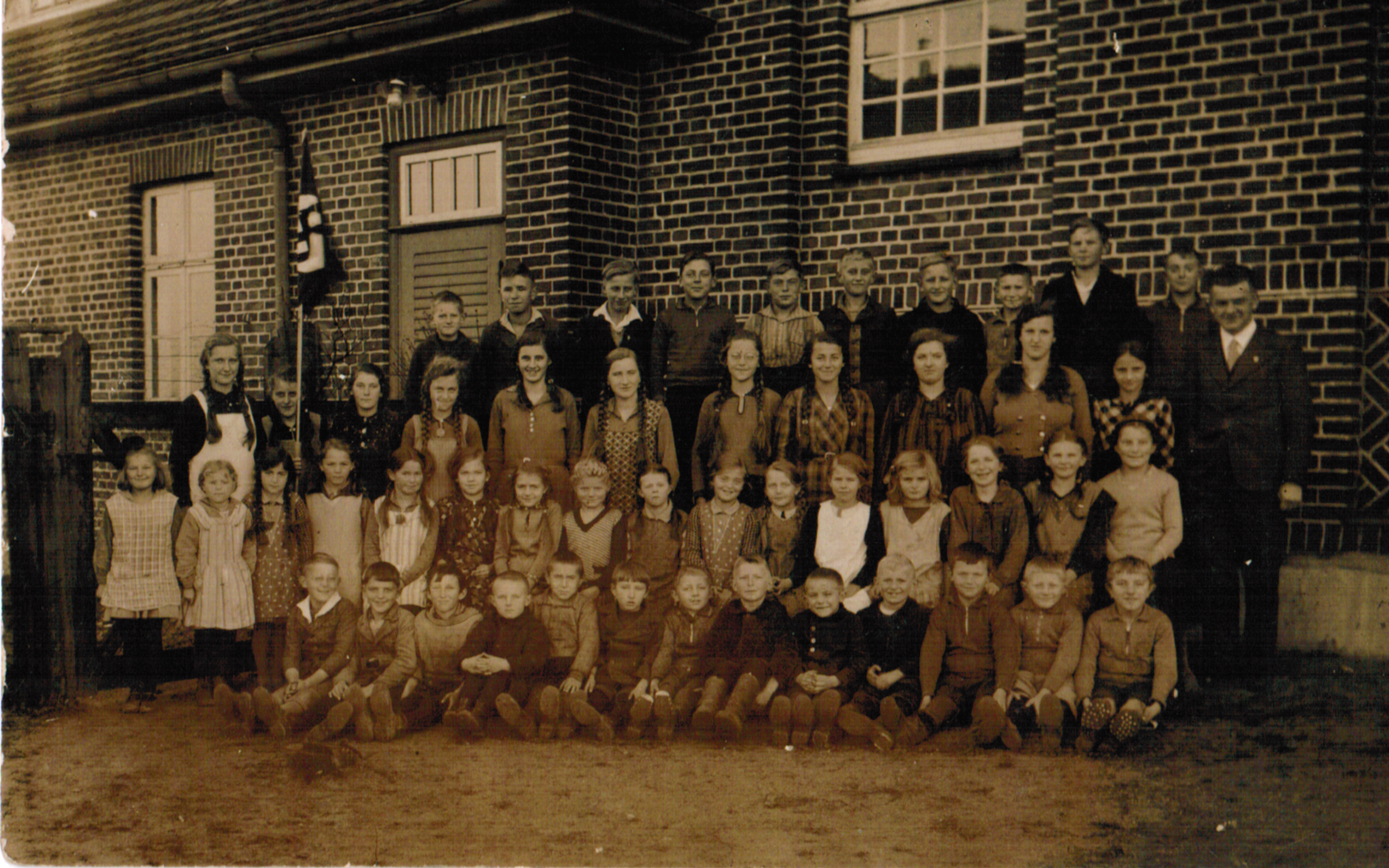 Dies ist ein Klassenfoto von 1934, das vor der Ollndorfer Schule geschossen worden ist.